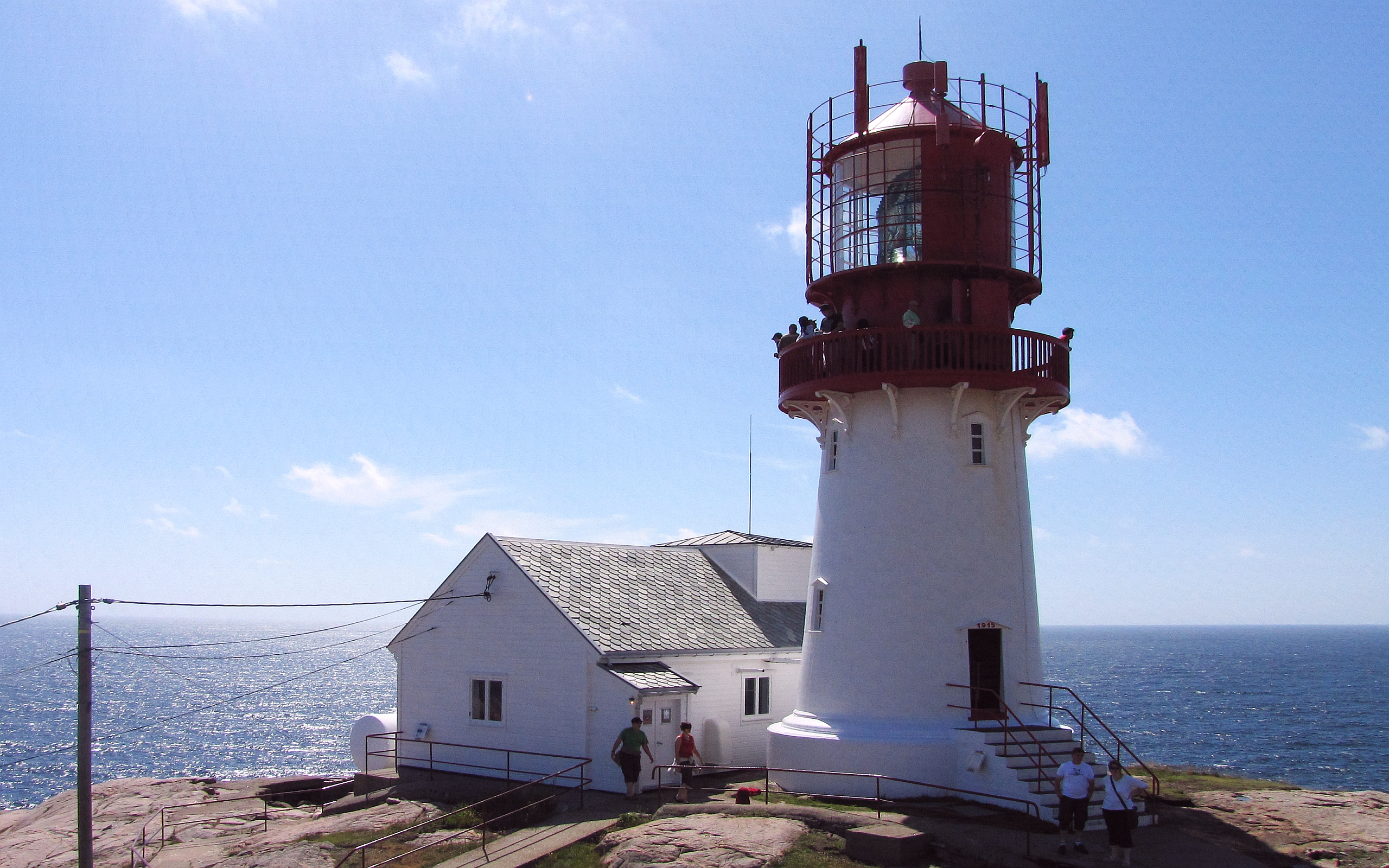 Lindesnes Fyr von Osten 50 m Lichthöhe NHN Leuchtturm aus Gusseisen 1915 Linse 1854 Rw 19 sm Foto Wolfgang Pehlemann IMG_9564